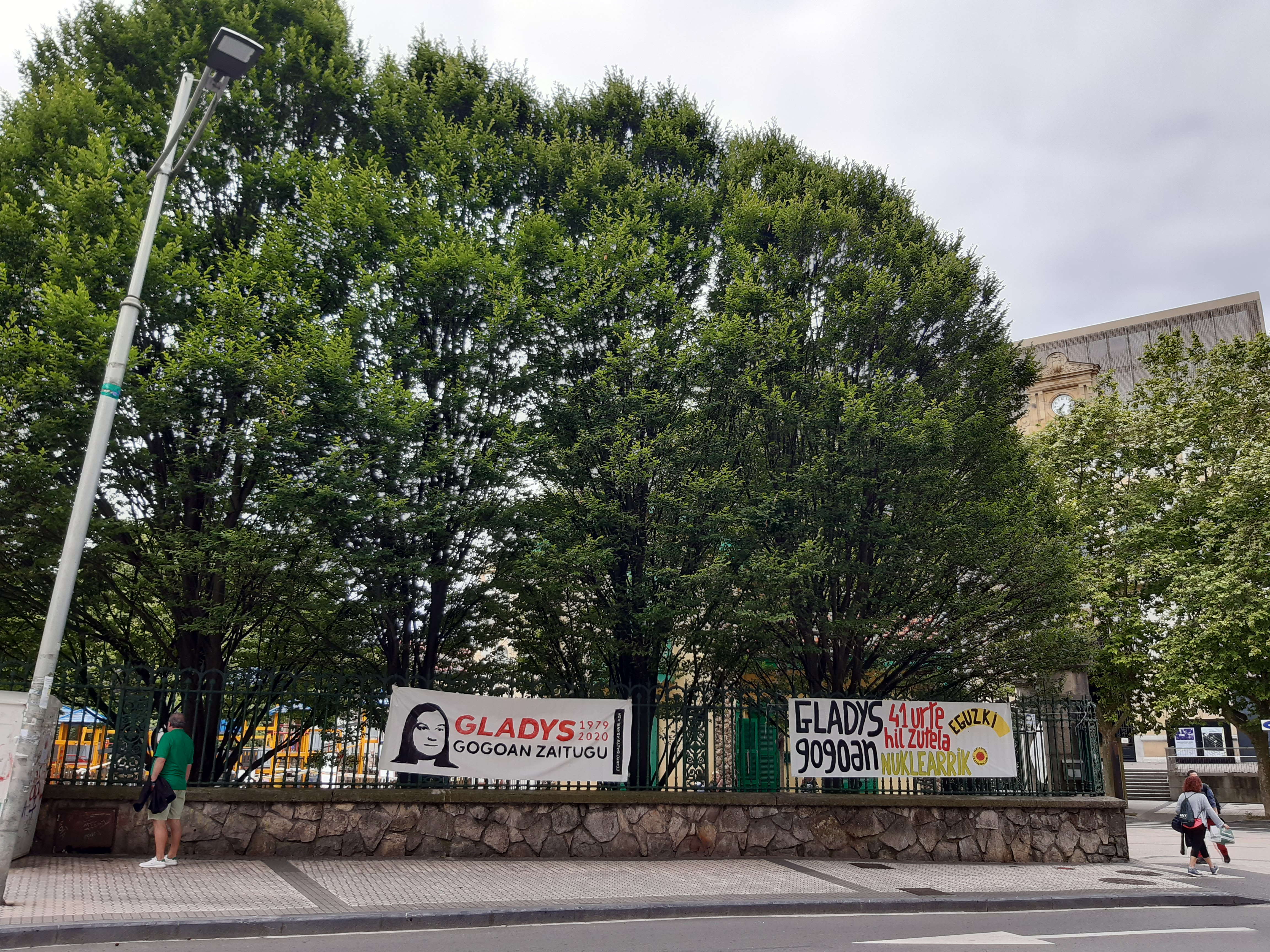 Gladys del Estalen omenezko urteurrun ekitaldia. Gladys del Estal aktibista ekologista Guardia Zibilak hil zuen Tuteran 1979an